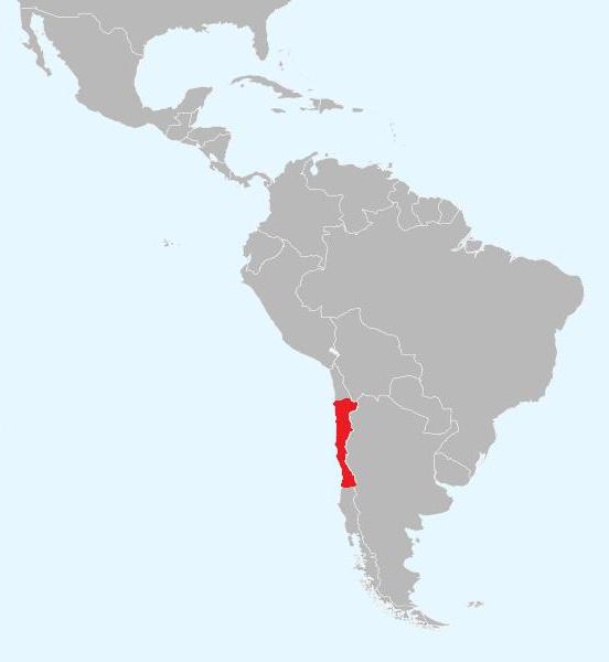 En rojo, la distribución de la iguana chilena